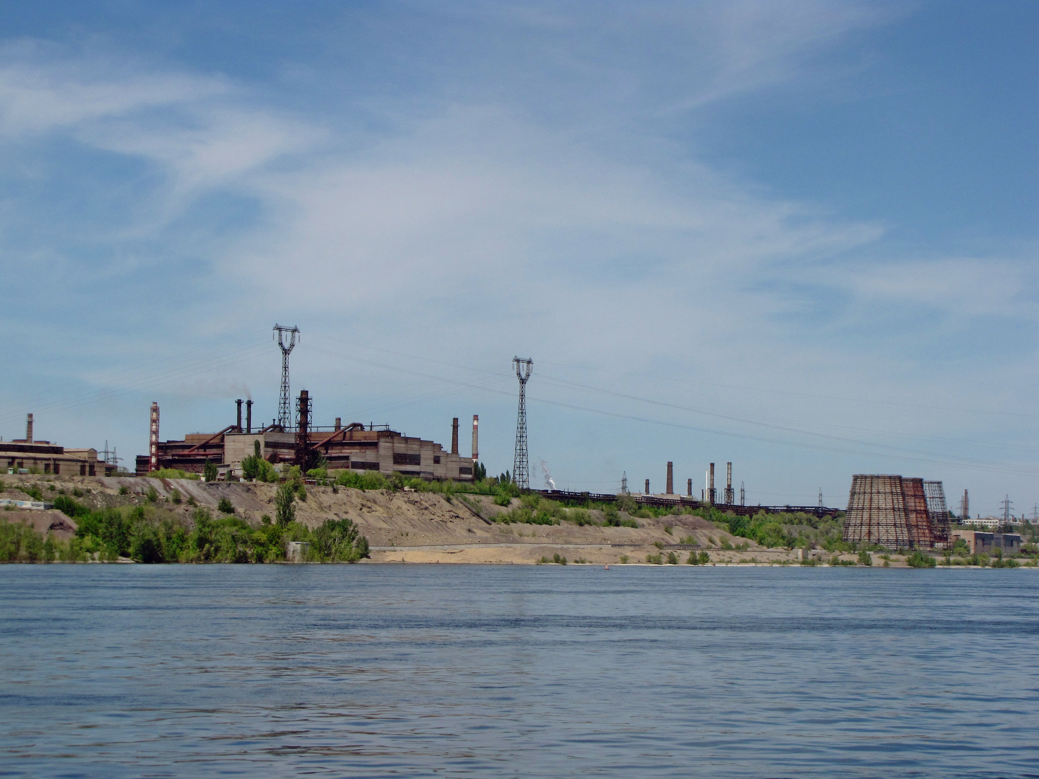 Завод "Красный Октябрь"